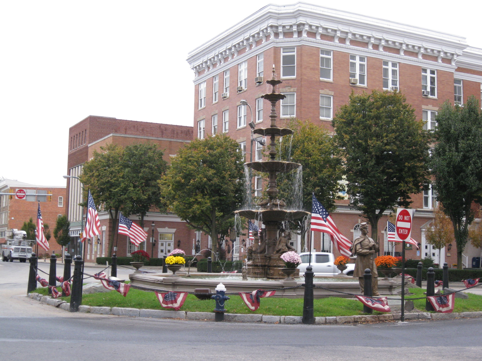 Chambersburg, Pennsylvania